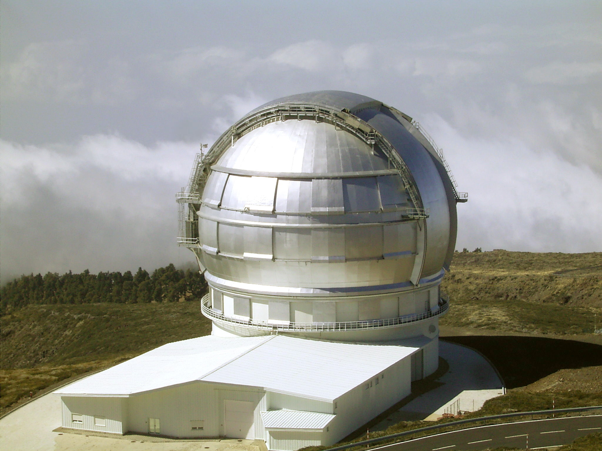 Roque de los Muchachos observatory, La Palma, Canary Islands